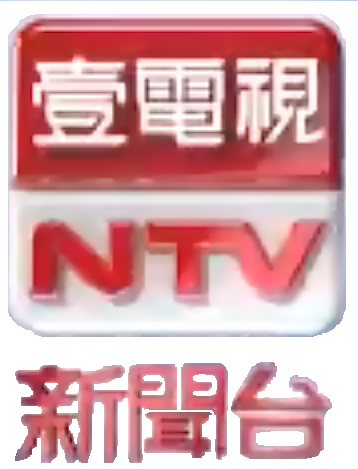 中文（台灣）: 壹電視新聞臺臺標